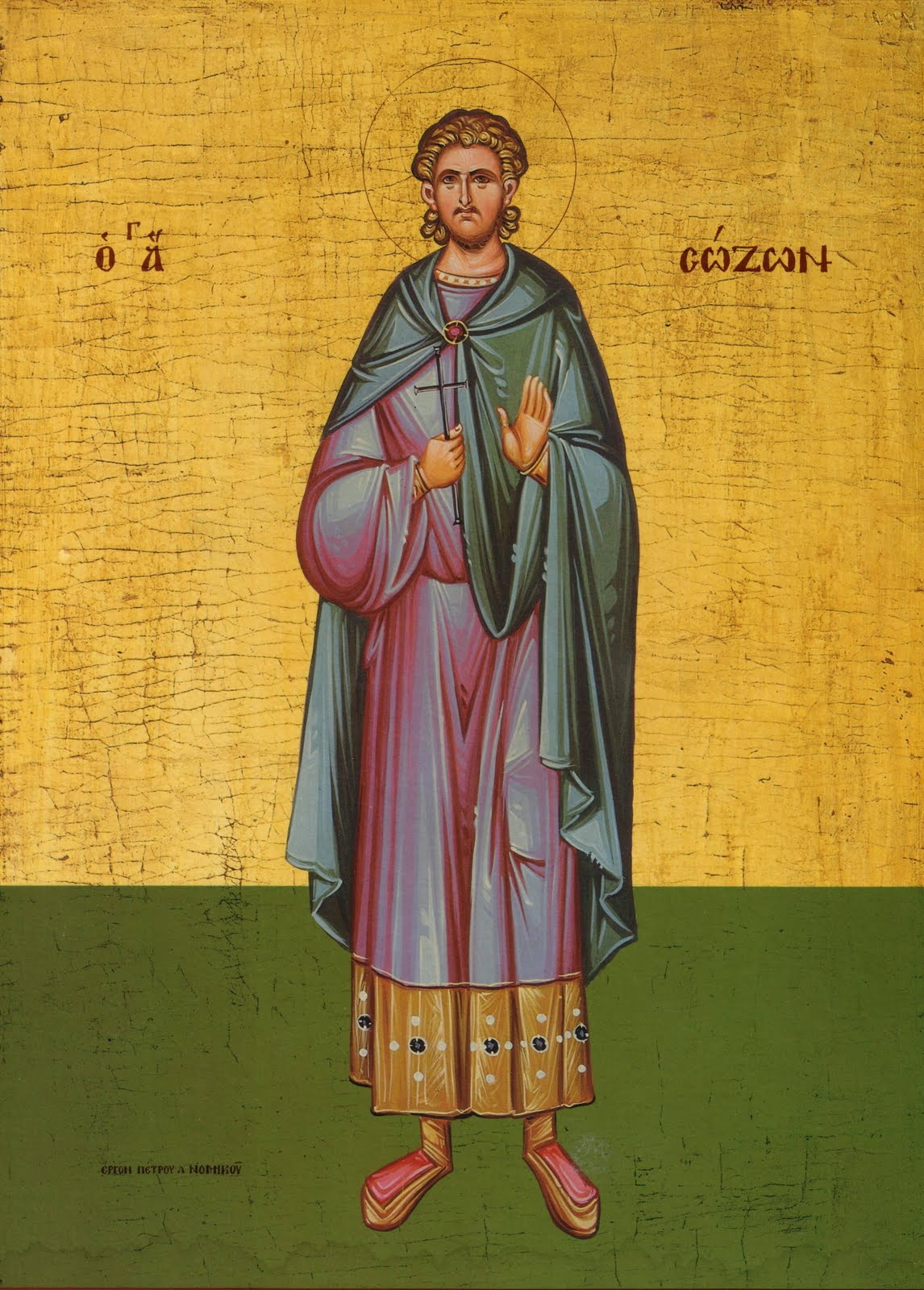 San Sozonte, Pompeopoli, 284-3025